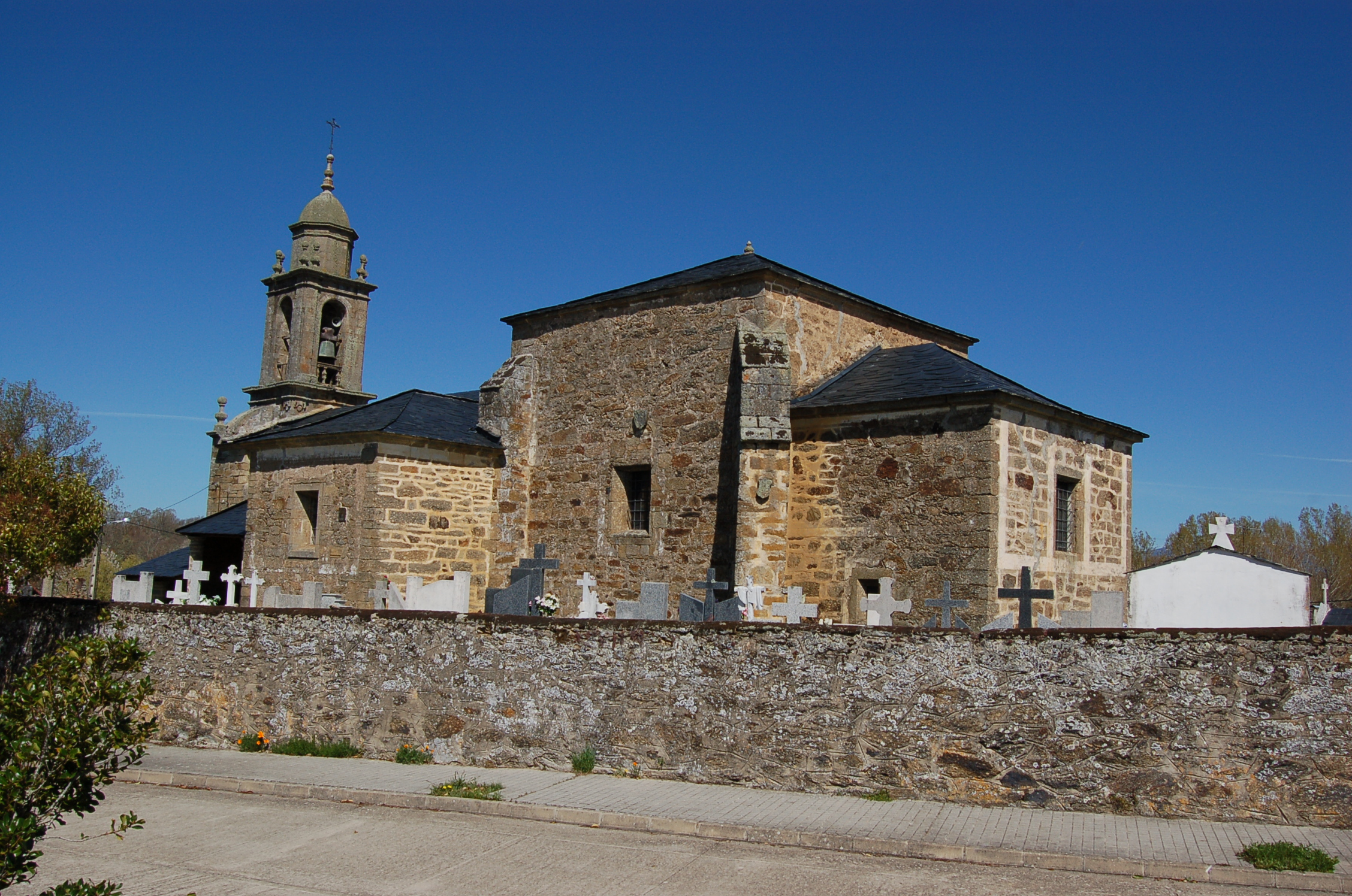 Igrexa parroquial de Cernadilla